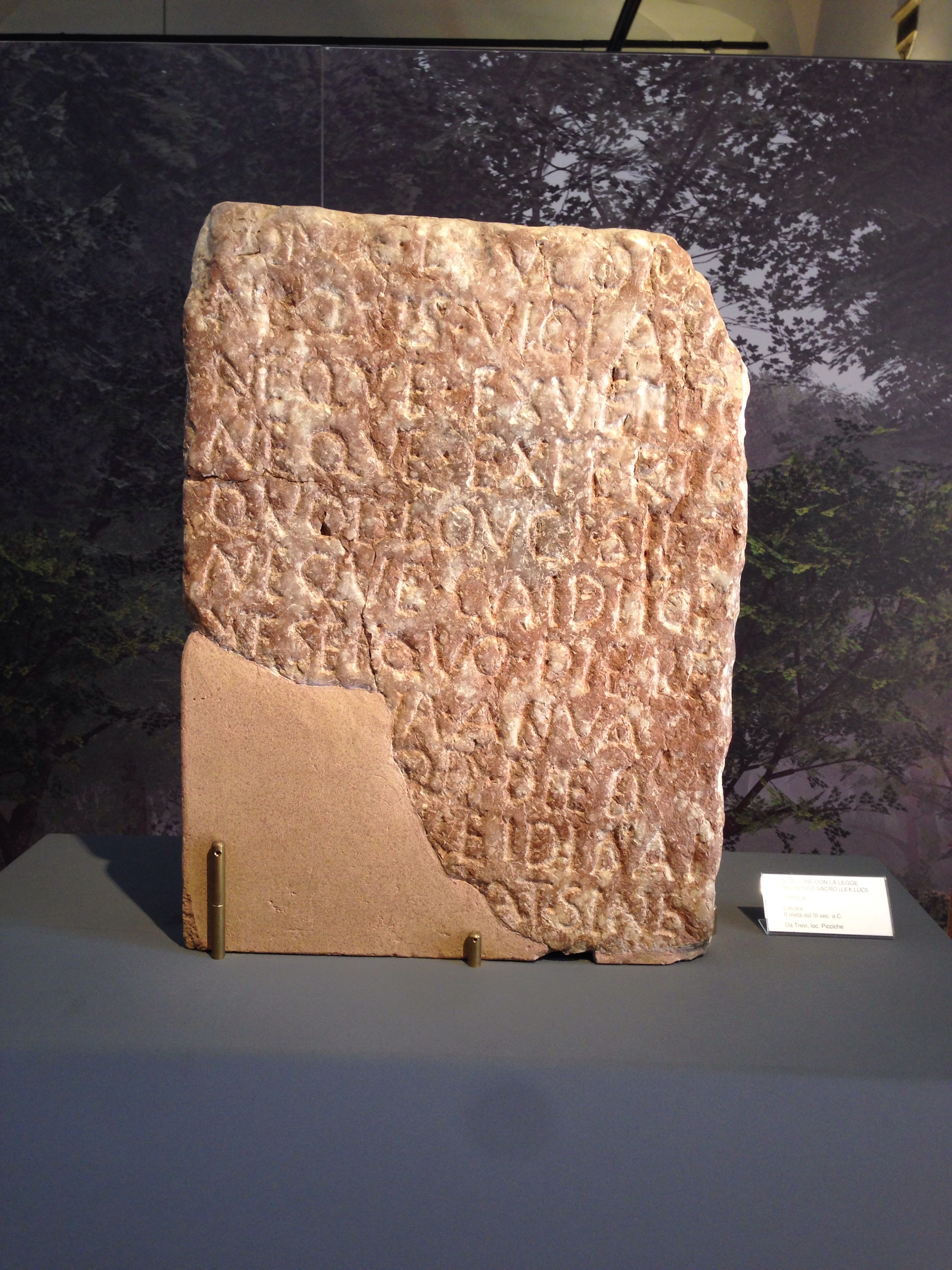 Museo archeologico Sant'Agata (Spoleto). CIL XI 4766 (p 1374) = CIL I 366a = ILLRP 505 = Spoletium-1990-5 = AE 1991, 626 = AE 1994, 583: Honce loucom / nequs violatod / neque exvehito neque / exferto quod louci / siet neque cedito / nesei quo die res deina / anua fiat eod die / quod rei dinai causa / [f]iat sine dolo cedre / [l]icetod seiquis // violasit Iove bovid / piaclum datod / seiquis scies / violasit dolo malo / Iovei bovid piaclum / datod et a(sses) CCC / moltai suntod / eius piacli / moltaique dicator[e] / exactio est[od]